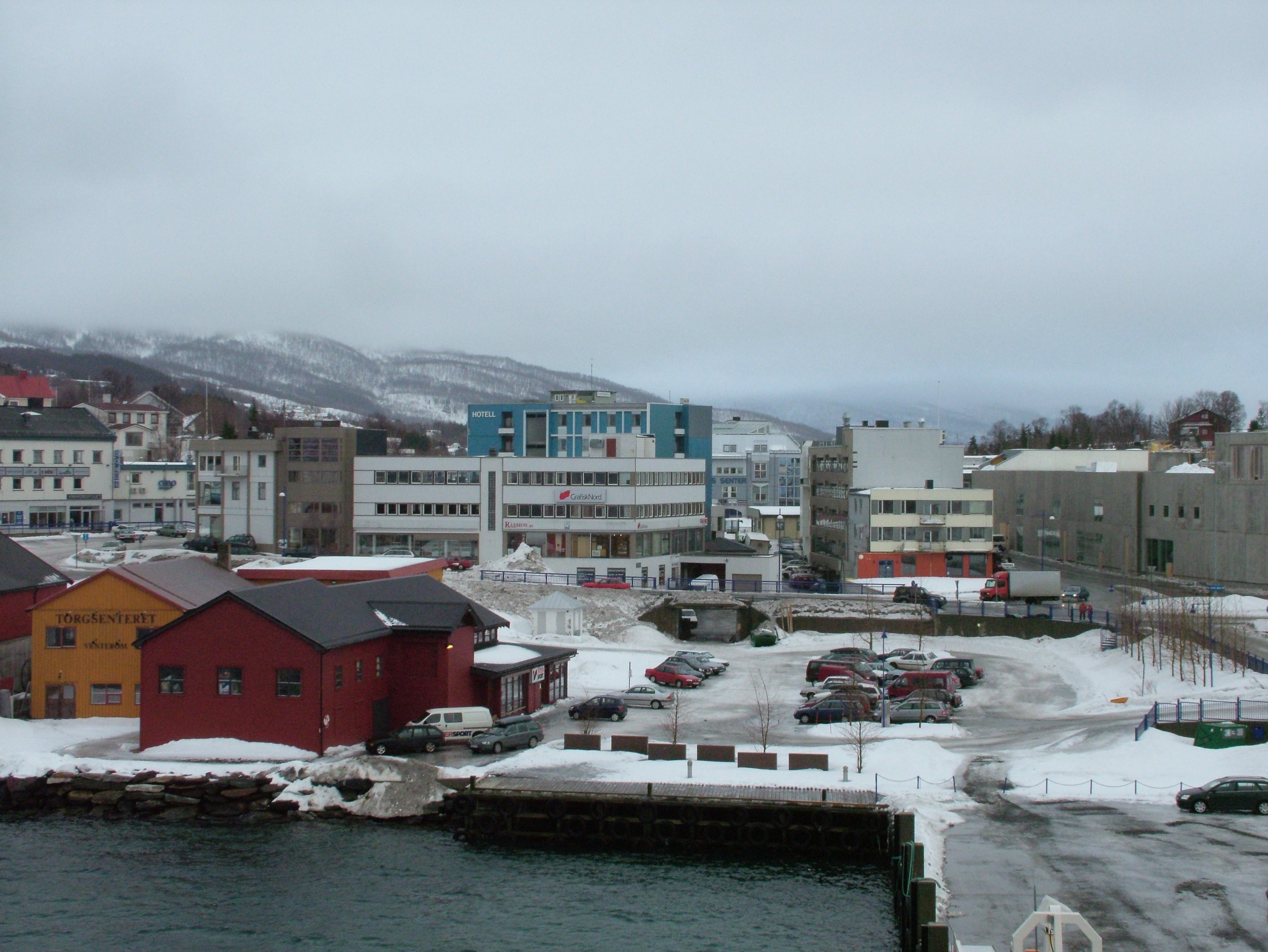 Der Hafen in Finnsnes Norwegen, Februar 2005